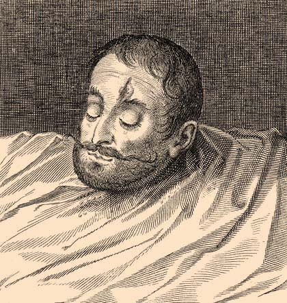 1599-ben készült rajz Báthory András levágott fejéről Mihály vajda megbízásából.